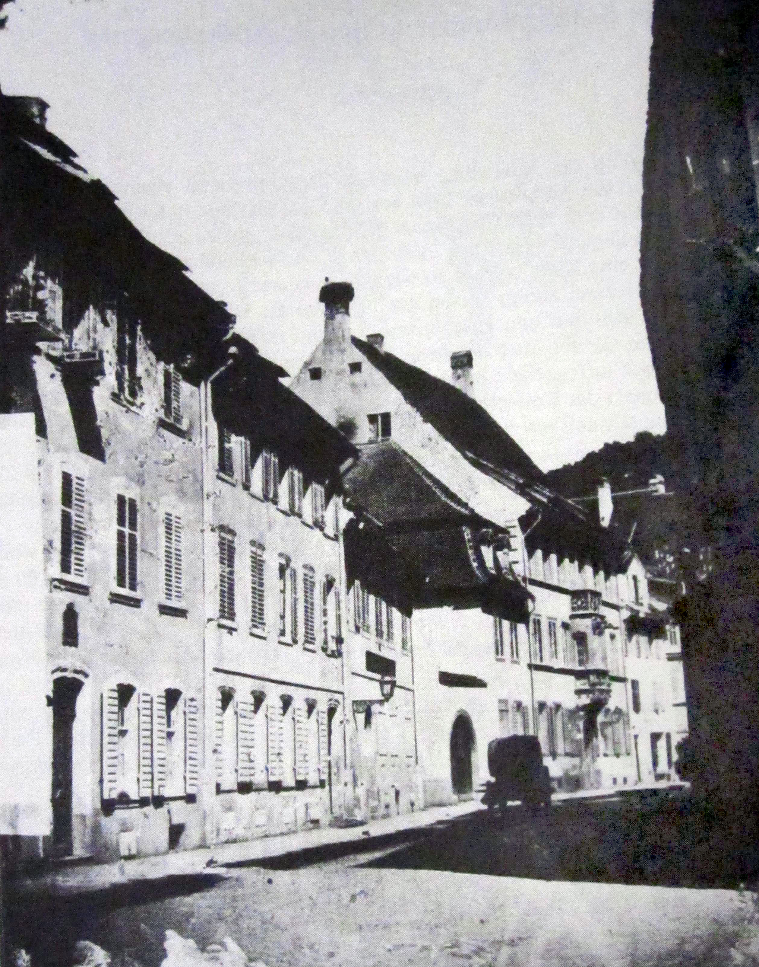 Ansicht um 1890, v.l.n.r.: Haus zum Pilgerstab, Haus zum Pilger, Haus zum Wachsstock